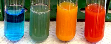 Benedict-reakció típusai